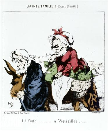 La fuga a Versailles di Jules Favre, Adolphe Thiers e del Conte di Parigi, caricatura.